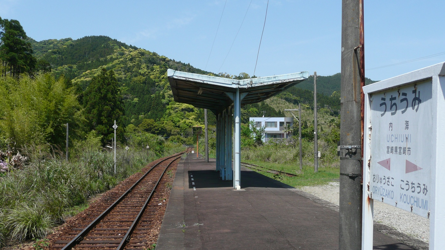 内海駅のホーム（日南線、日本）